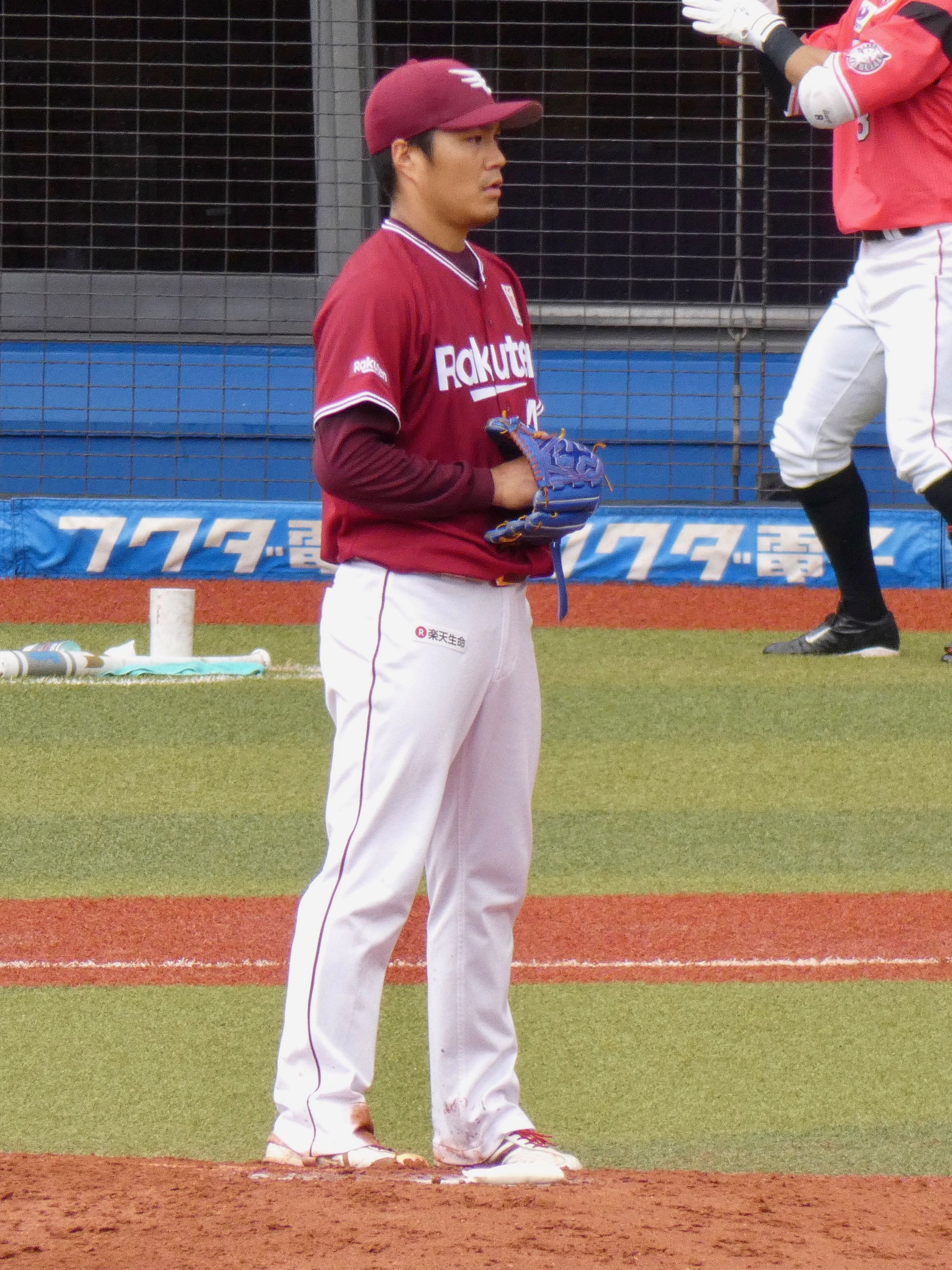 東北楽天ゴールデンイーグルスの選手。ZOZOマリンスタジアムにて。